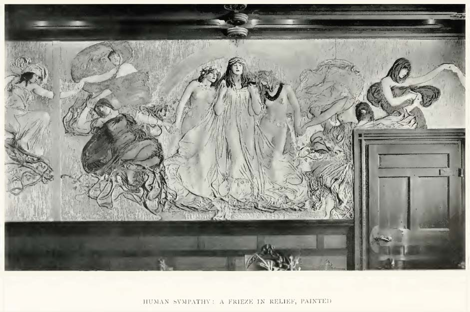 Lululaund mansion.